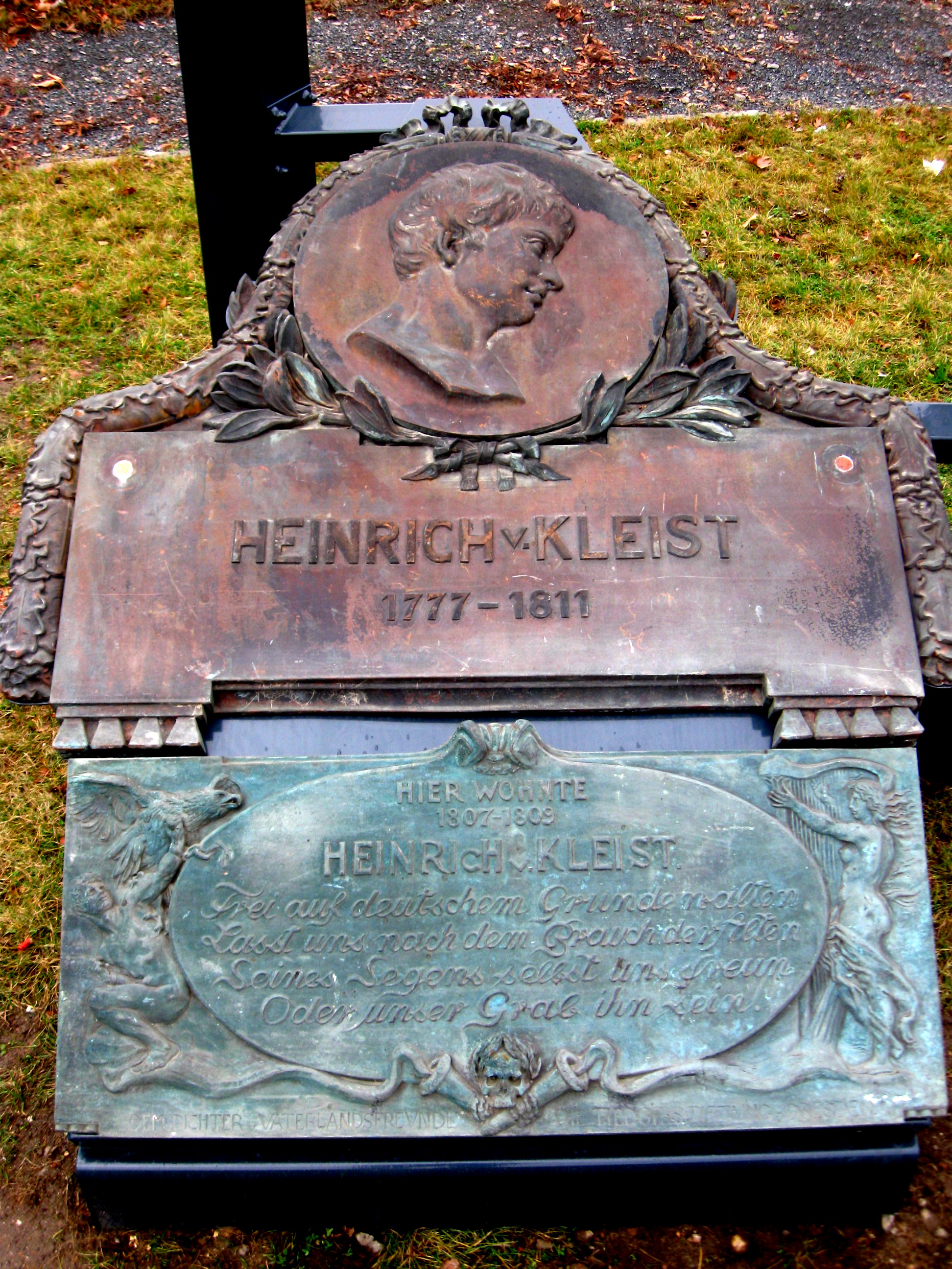 Detail des Kleistdenkmals von 2011 in Dresden-Altstadt, Pillnitzer Str. Ecke Gerichtsstr., am Ort seines ehemaligen Wohnhauses "Äußere Rampische Gasse" (später Pillnitzer Str. 29; am 13.2.1945 zerstört) mit den Relikten der Gedenktafeln der Tiedgestiftung von 1909.